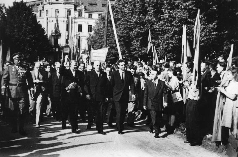 Görlitzer Abkommen Illus: Die Friedensgrenze an der Oder und Neisse. Polnisch-Deutsches Grenzmarkierungsabkommen unterzeichnet. Am 6. Juli 1950 traf in der polnischen Grenzstadt Zgorzelec, an der Lausitzer Neisse, eine Regierungsdelegation der Deutschen Demokratischen Republik ein, um ein Abkommen über die Grenzmarkierung zu unterzeichnen. Die Deutsche Delegation setzte sich aus Ministerpräsident Otto Grotewohl, Aussenminister Dertinger, sowie den Ministern Rau, Handke, den Staatssekretären Ackermann, Warnke, Rumpf und leitenden Beamten des Aussenministeriums zusammen. Sie wurde von polnischer Seite durch Premierminister Cyrankiewicz, den stellvertretenden Premierminister Chelchowski, den Leiter des Aussenministeriums Wieblowski, sowie Minister Jedrychowski, Kabanowski, Rupacki und Dybowski und Vertretern des öffentlichen Lebens begrüsst. Der Chef der Diplomatischen Mission der Deutschen Demokratischen Republik, Friedrich Wolff, war ebenfalls anwesend. Die Unterzeichnung des Abkommens erfolgte im Hause der Kultur der Stadt Zgorzelec. UBz.: Der Premierminister der Republik Polen, Joseph Gyrankiewicz und der Ministerpräsident der DDR, Otto Grotewohl in den Strassen von Zgorzelec, begeben sich nach dem Kulturhaus zur Unterzeichnung des Grenzabkommens. 7255 - 50 17.7.50 [Herausgabedatum] Zentralbild: 6.7.1950 Das Abkommen über die Markierung der festgelegten und bestehenden deutsch-polnischen Staatsgrenze wird in Zgorzelec von den Ministerpräsidenten der DDR und der Volksrepublik Polen unterzeichnet. UBz der Ministerpräsident der Volksrepublik Polen, Josef Cyrankiewicz, und der Ministerpräsident der Deutschen Demokratischen Republik, Otto Grotewohl, begeben sich zum Kulturhaus zur Unterzeichnung des Grenzabkommens. Abgebildete Personen: Grotewohl, Otto: Ministerpräsident, stellvertretender Staatsratsvorsitzender, DDR (GND 118542680) Cyrankiewicz, Józef: Ministerpräsident, Mitglied des Weltfriedensrates, Polen (GND 119518503)